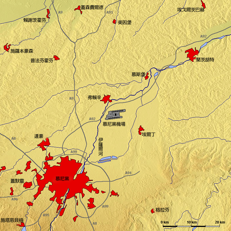 Lage vom Flughafen München